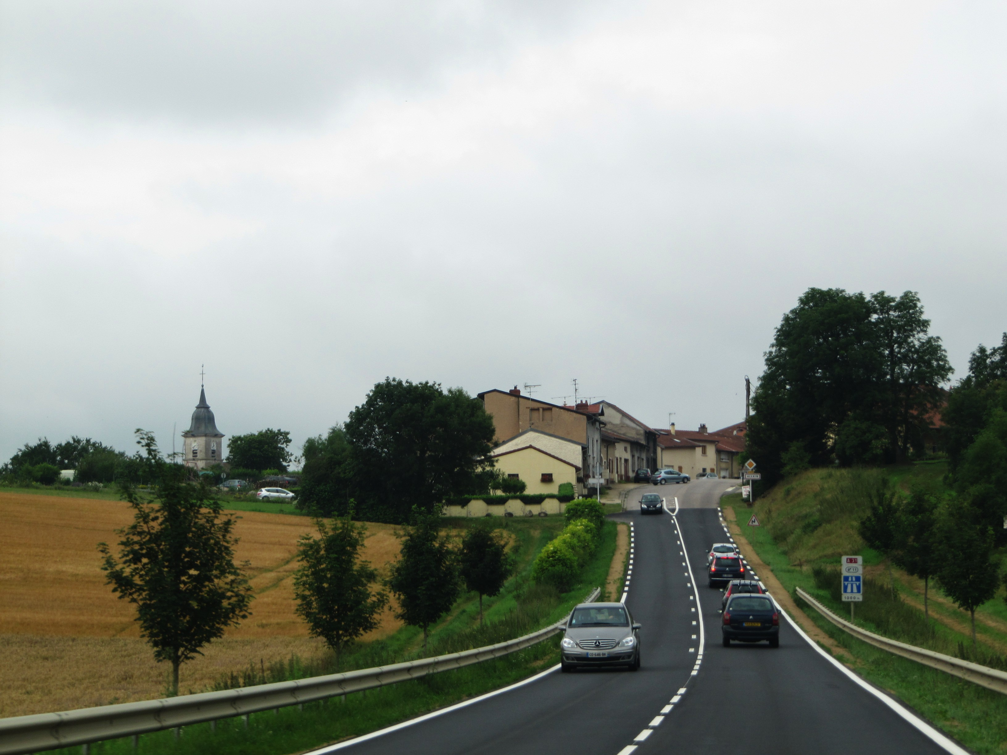 Allain